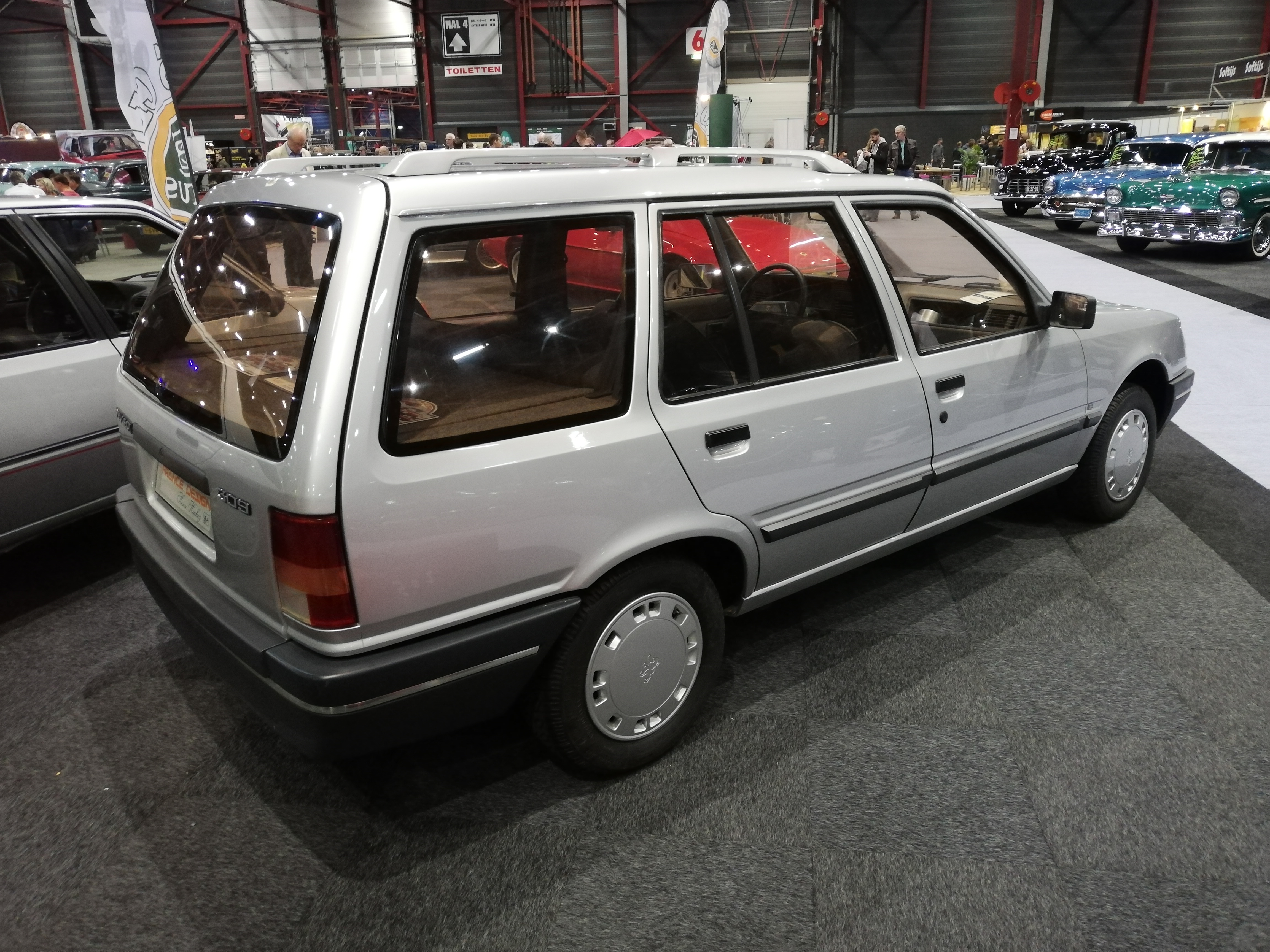 Peugeot 309 Break Heuliez (1988) bij CLASSICSNL 2018 in Leeuwarden.